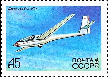 Почтовая марка СССР. ЛАК-12 «Летува». Номер в каталоге ЦФА 5371